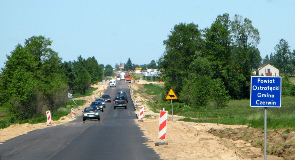 Gmina Czerwin, powiat ostrołęcki, województwo mazowieckie, Polska